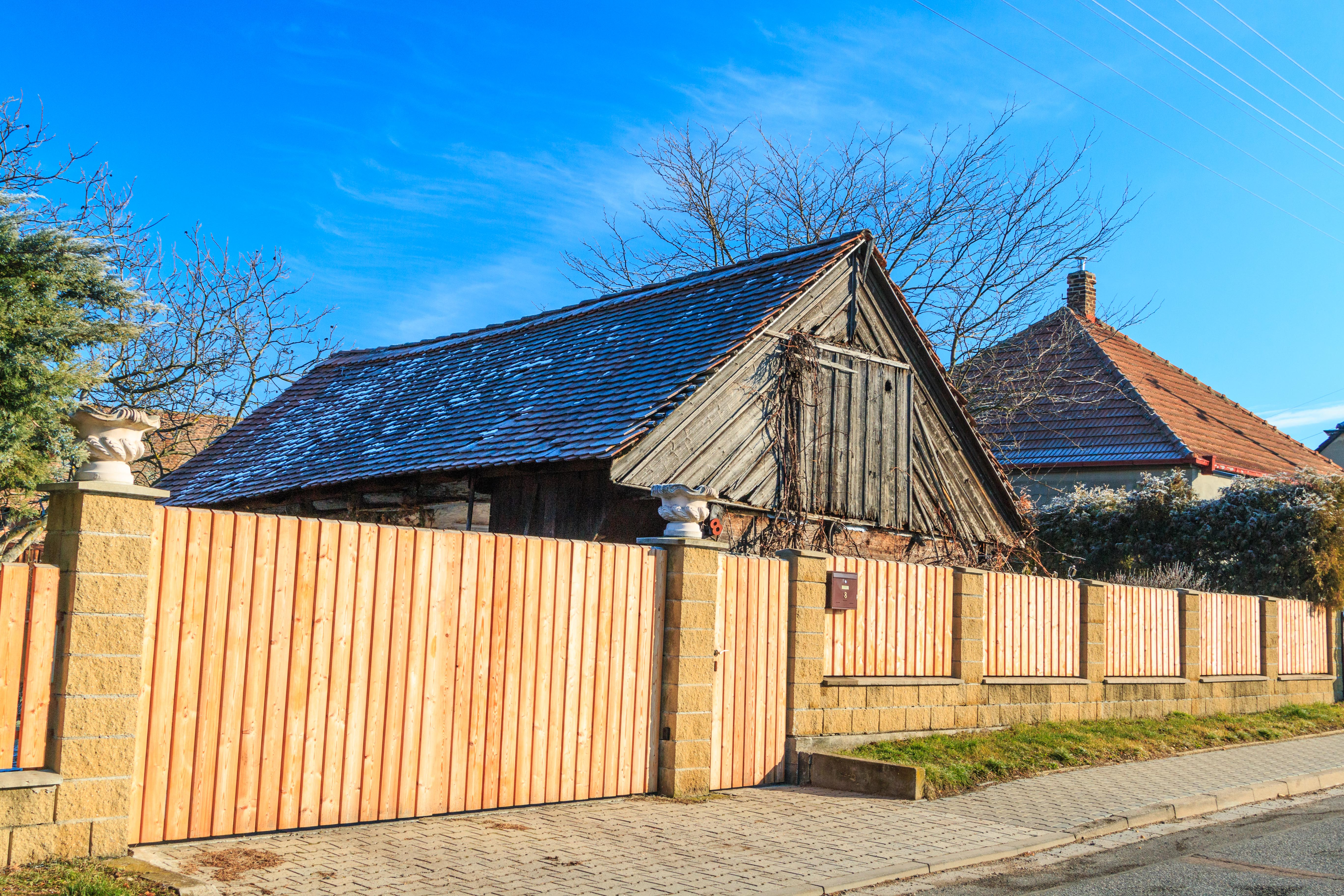 Sýpka, u čp. 8, st. 21, Lány na Důlku.